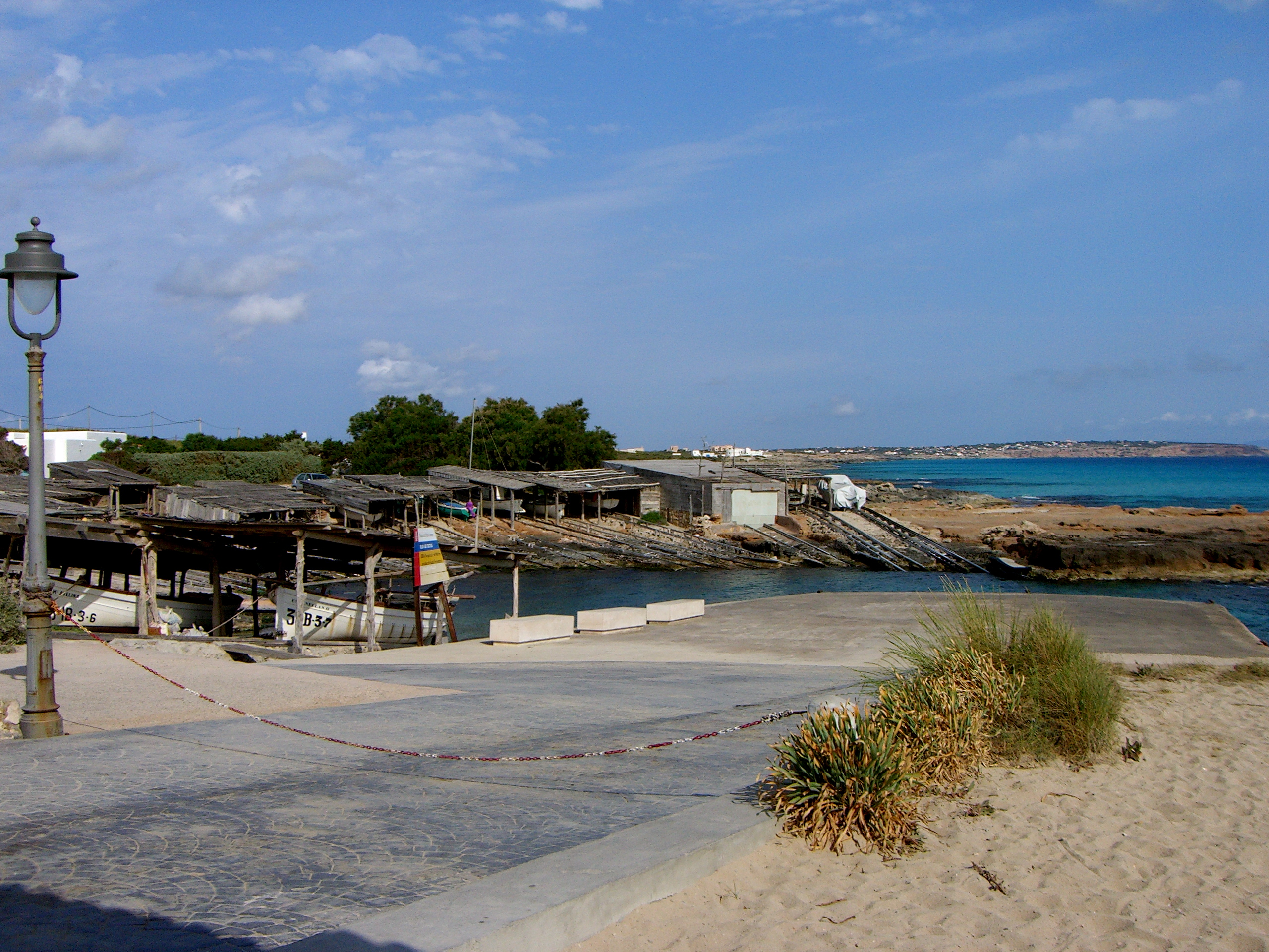 Port des Caló, a Formentera